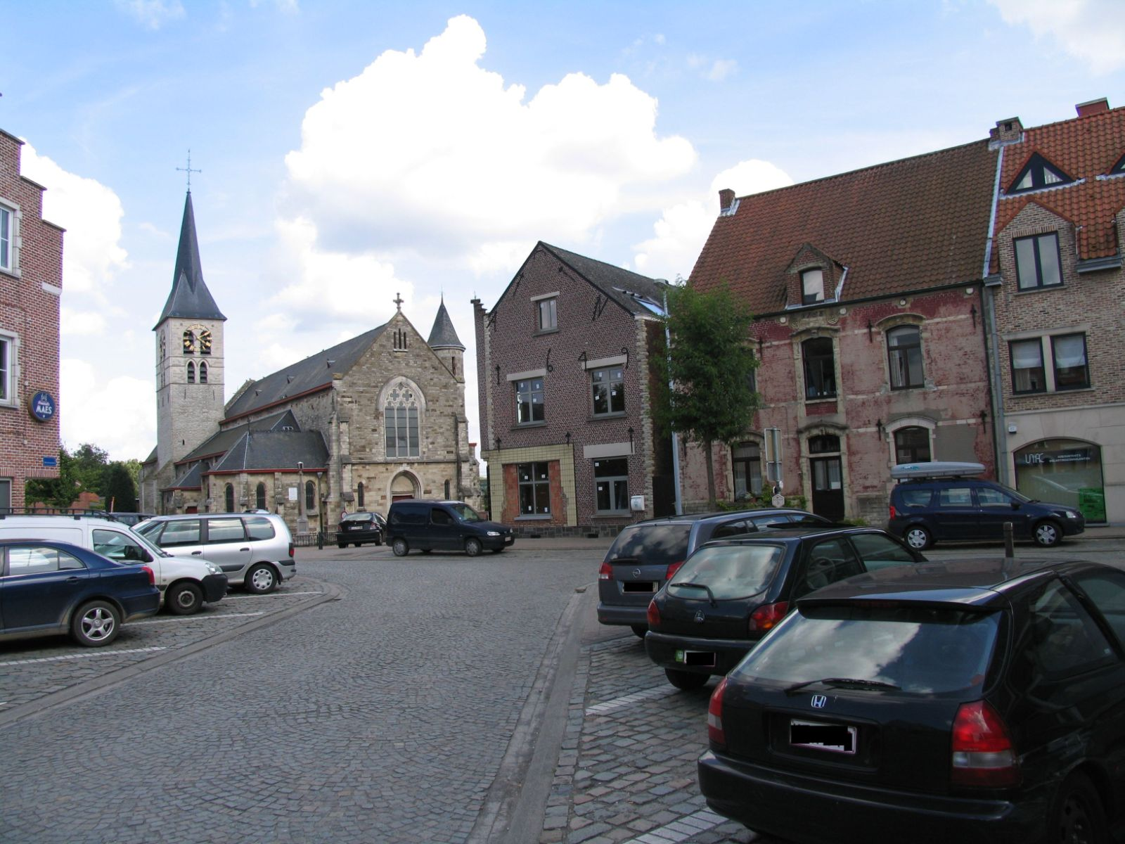 Dorpsplein Eppegem